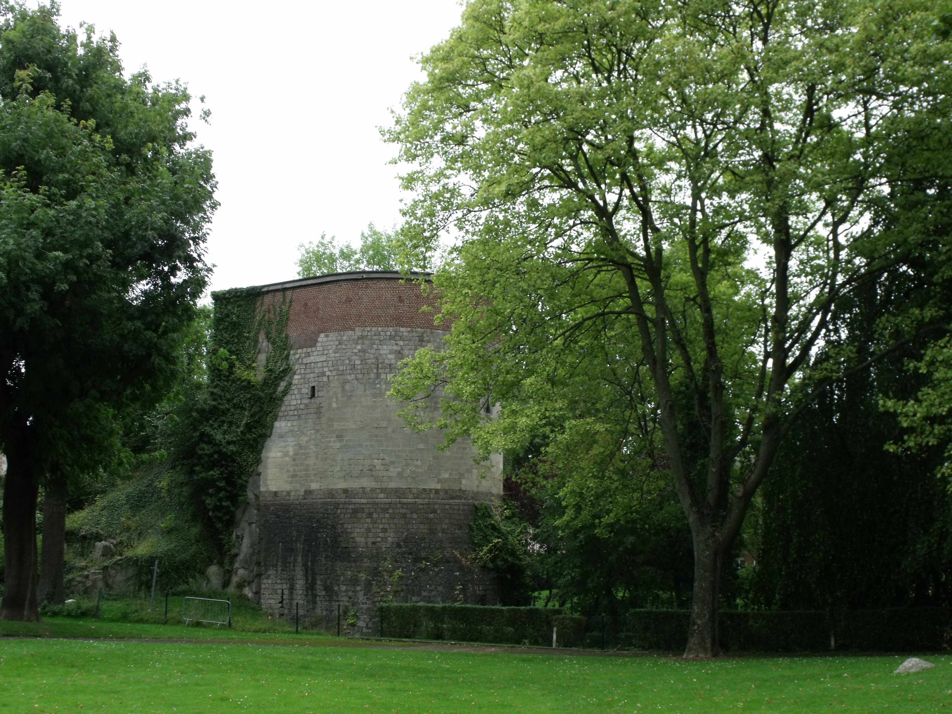 tour vue de face